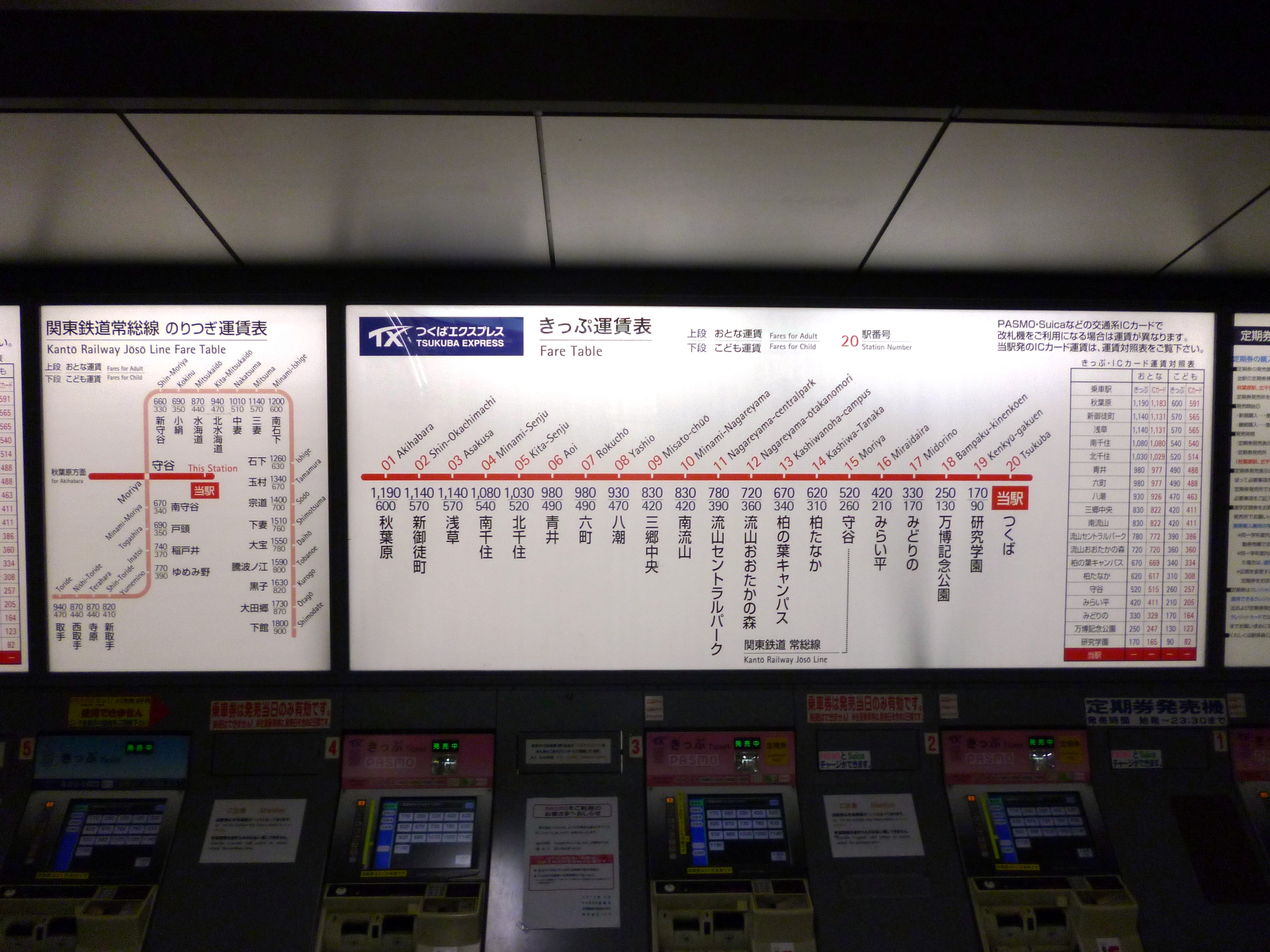 2014年4月の運賃改定後のつくばエクスプレス運賃表と関東鉄道常総線のりつぎ運賃表。